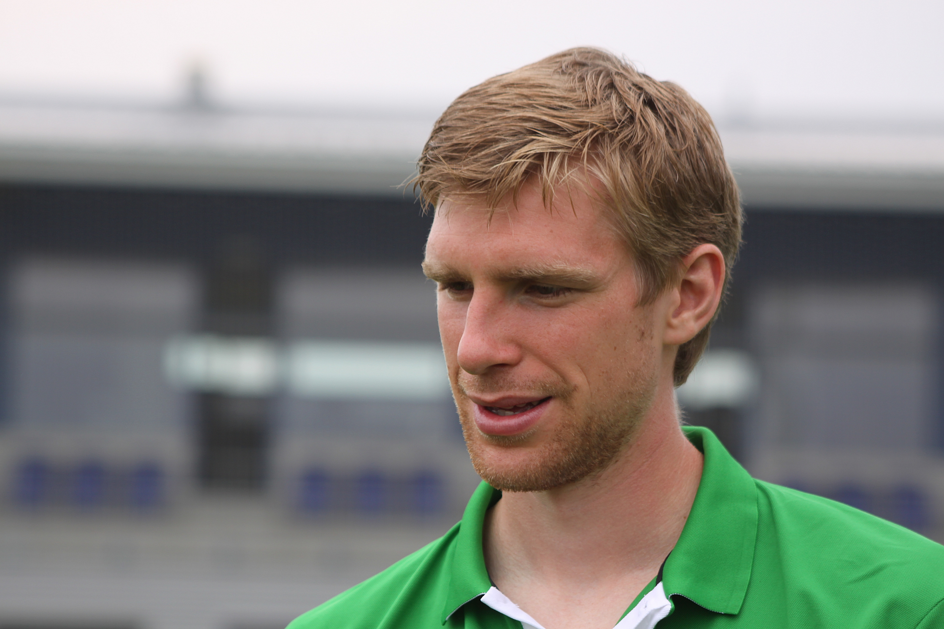 Per Mertesacker - SV Werder Bremen (2)